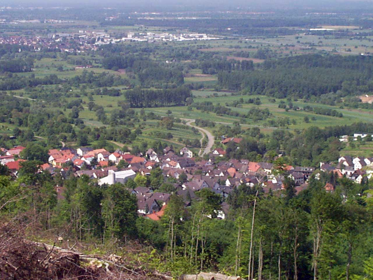 Sulzbach bei Malsch Kreis Karlsruhe